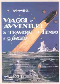 Copertina di Yambo del suo libro Viaggi e avventure attraverso il tempo e lo spazio, Firenze, Vallecchi, 1933.